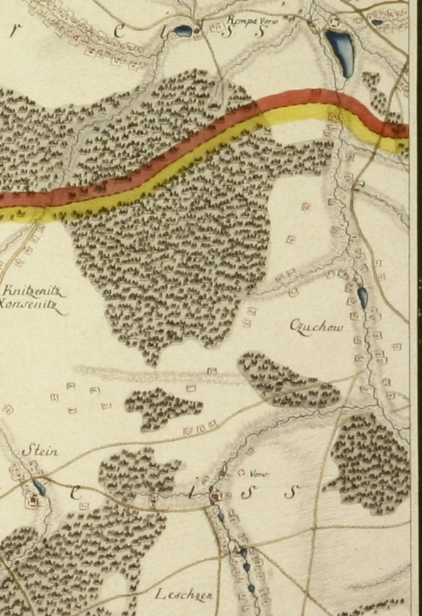 Czuchów i okoliczne tereny.